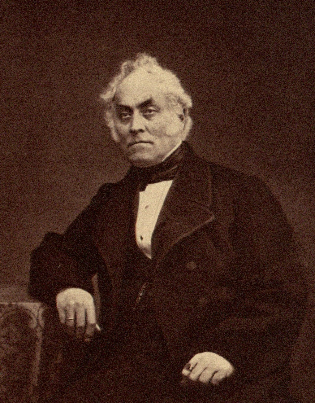 Johann Reinhard Blum, Mineraloge, 1828–1877 Professor in Heidelberg